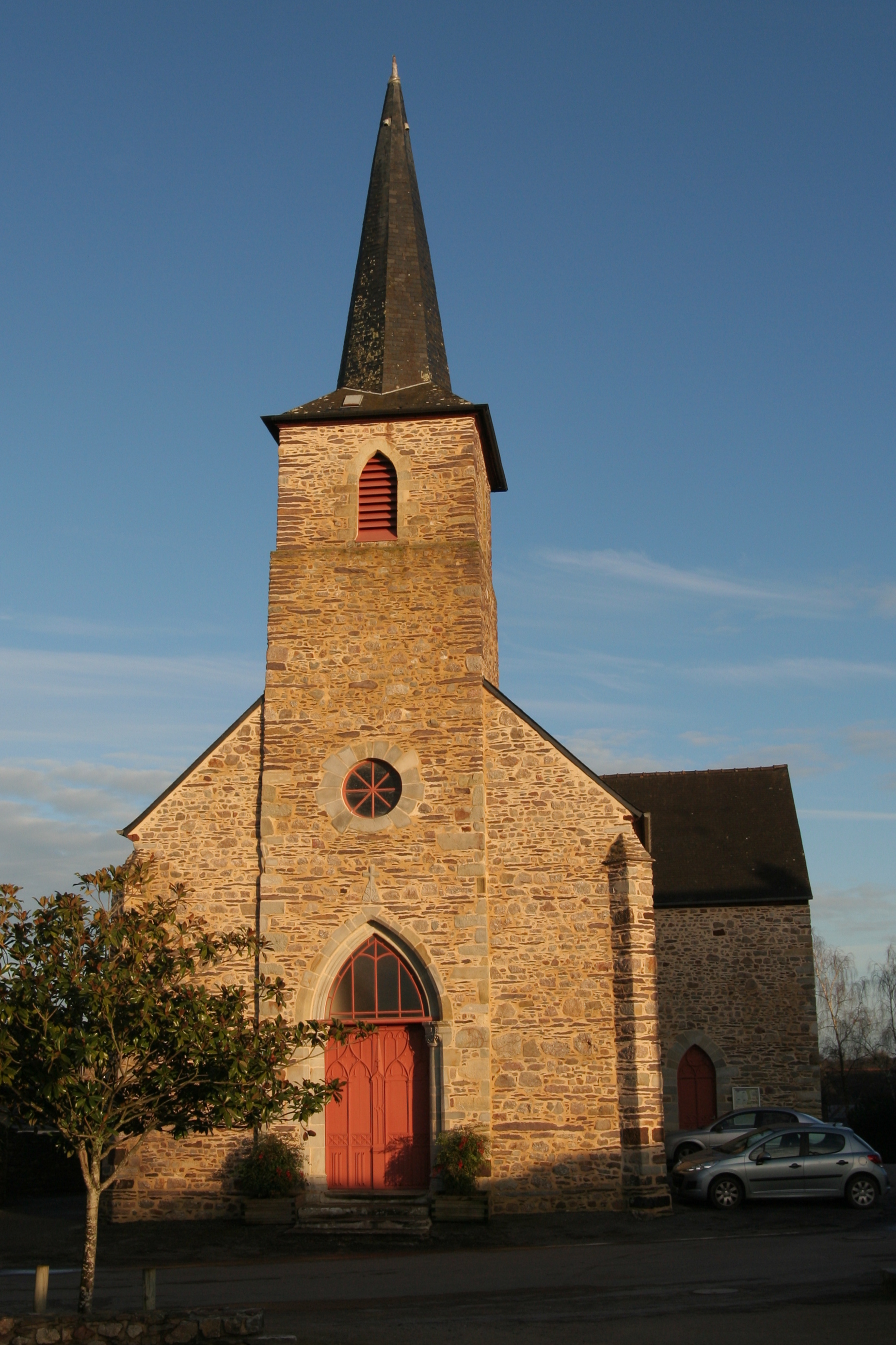 Église Saint-Martin de Mernel.